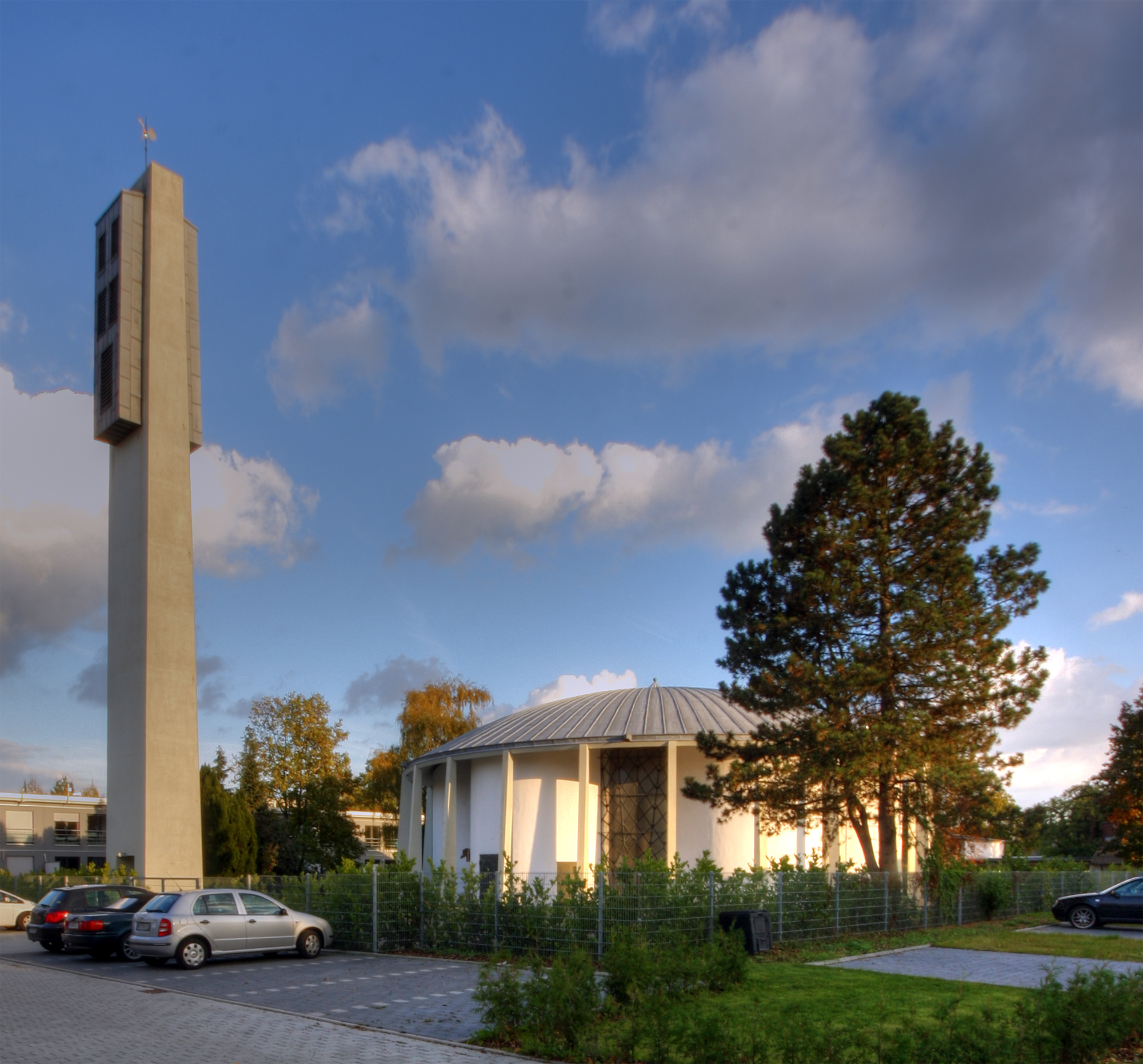 Hürth-Kalscheuren, St. Ursula. Architekt: Gottfried Böhm